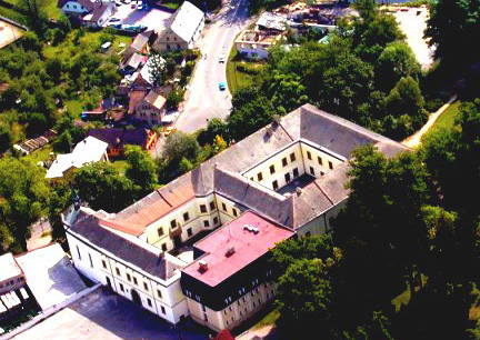 Letecký snímek budovy školy